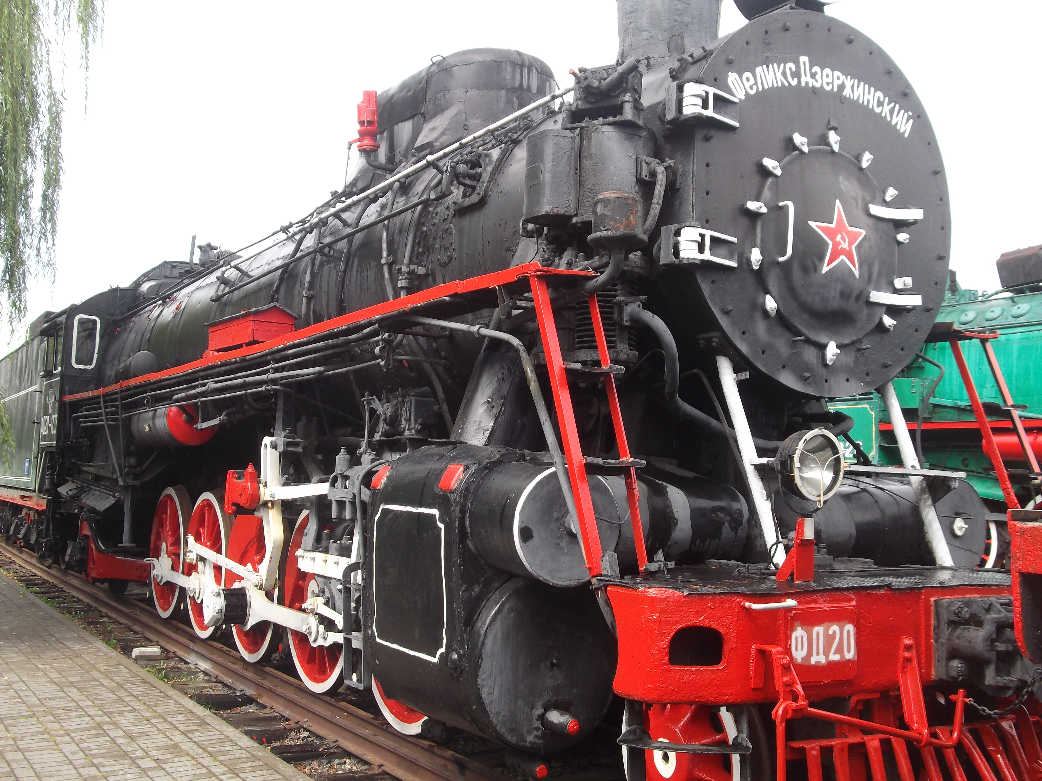 Музей железнодорожной техники